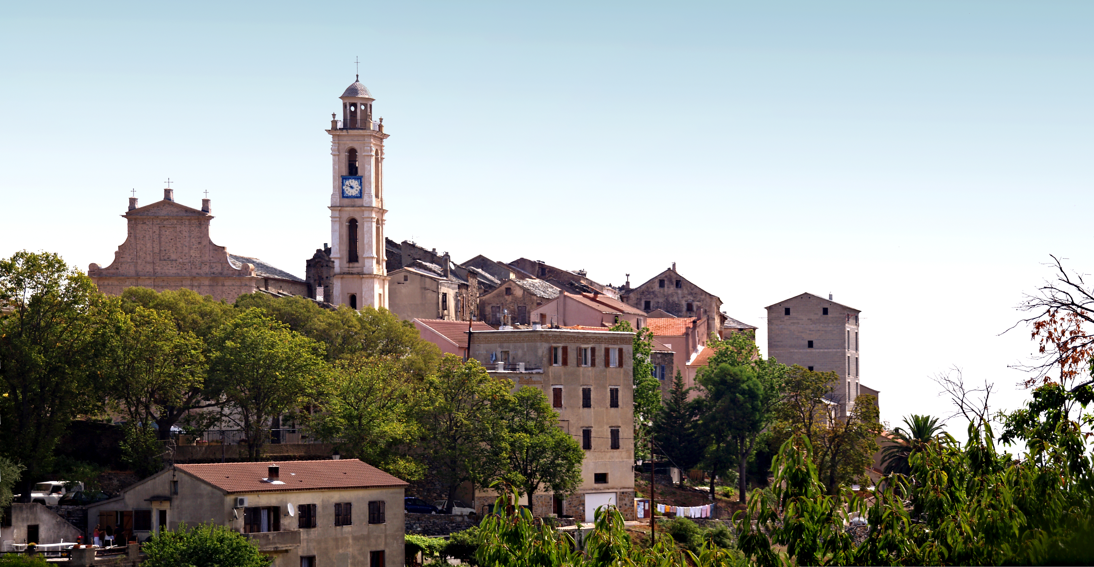 Borgo (Corse) - Panorama du village